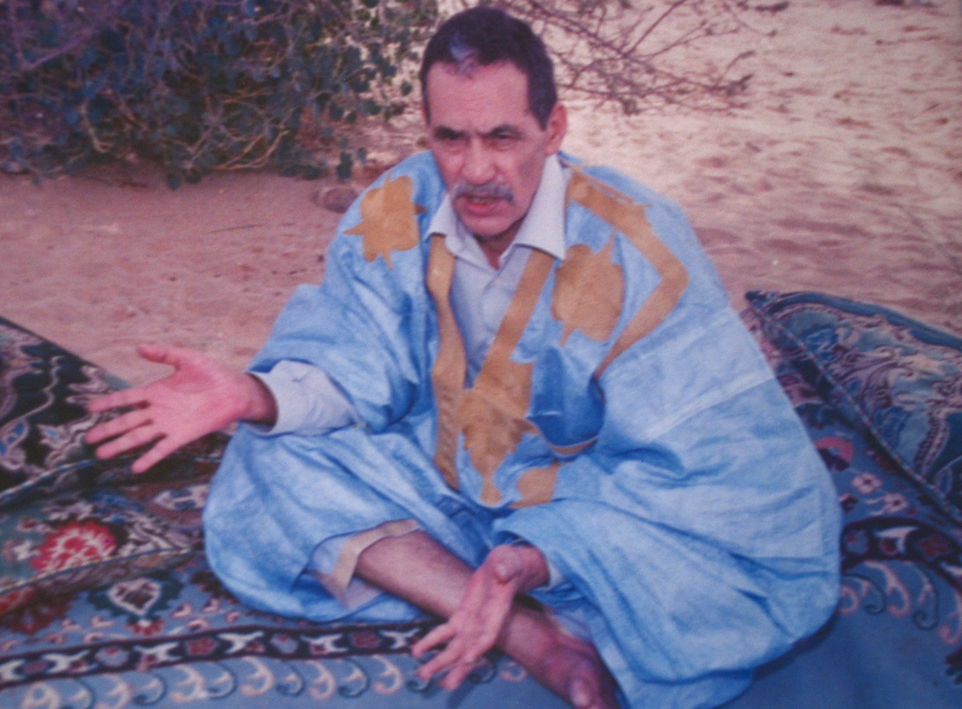 Hammoudi Bouhanana (Hammoudi Bouhnana, Hammoudi Bouhannana)